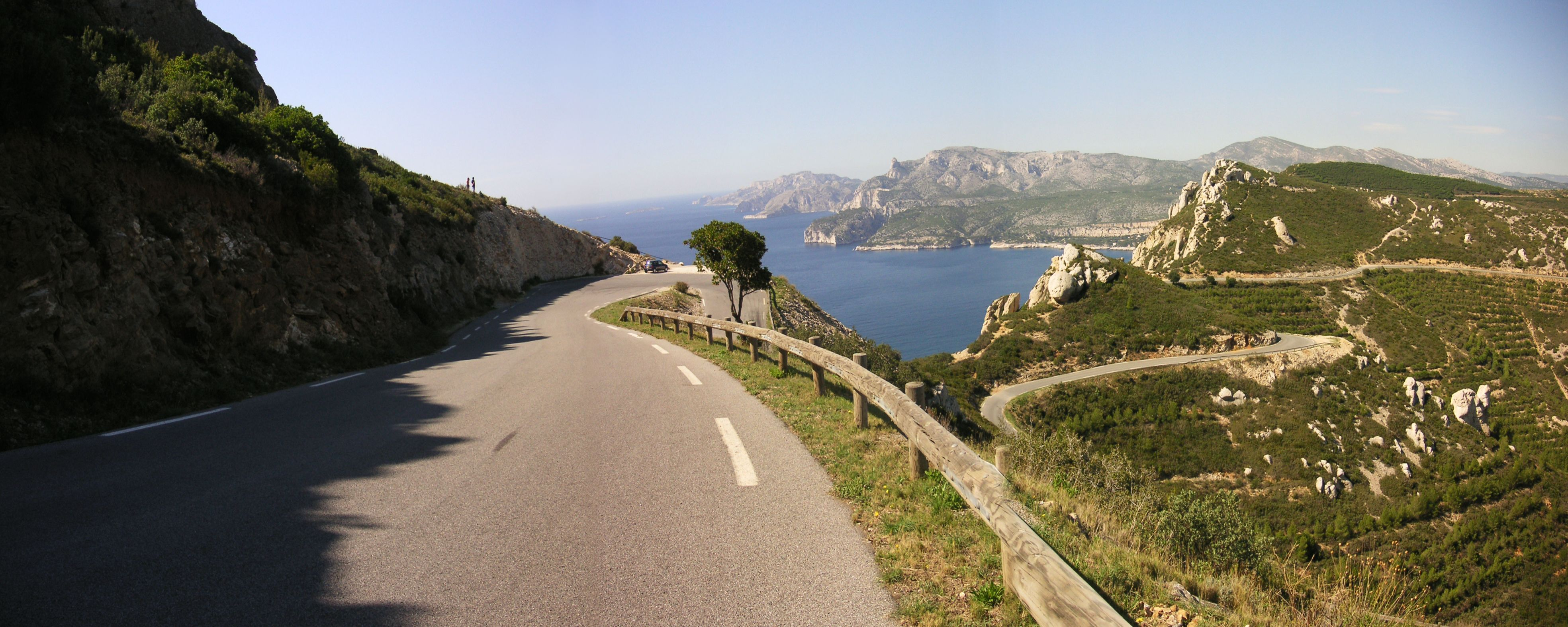 Photo panoramique des calanques vers Cassis depuis la route des Crêtes; photos prises entre Cassis et La Ciotat (France). La Cigale 08:56, 19 March 2006 (UTC)